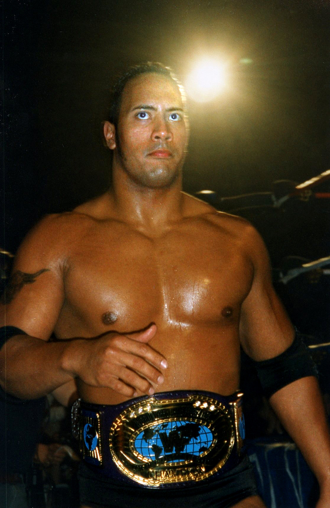 WWE - Manchester 040498 (18)